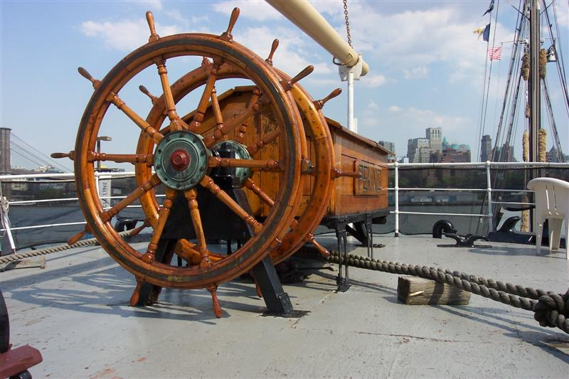 Steuer der Peking/ New York.